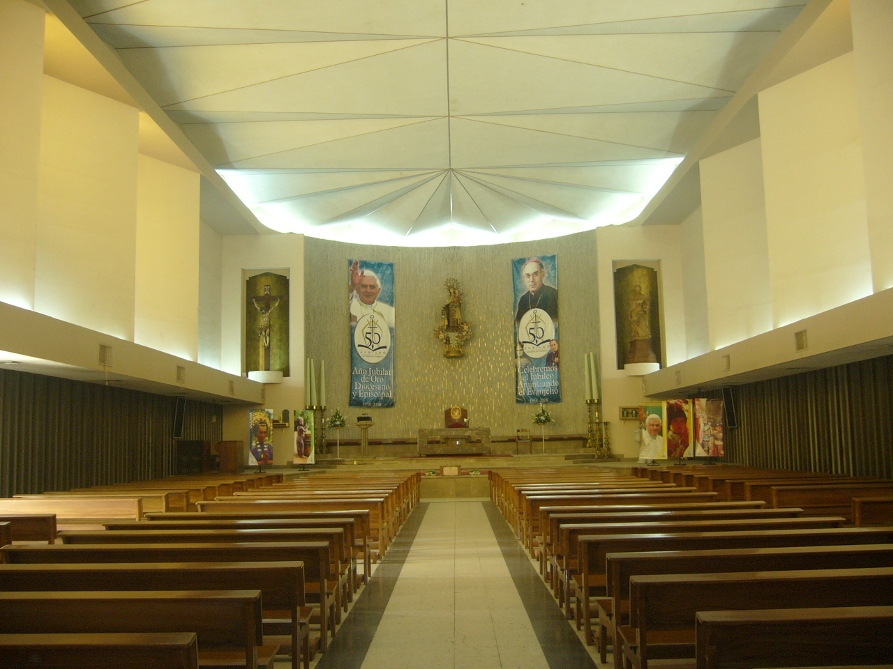 Interior de la catedral de Torreón, Coahuila, México.